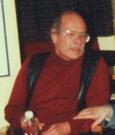 Con su chaleco de pelos.